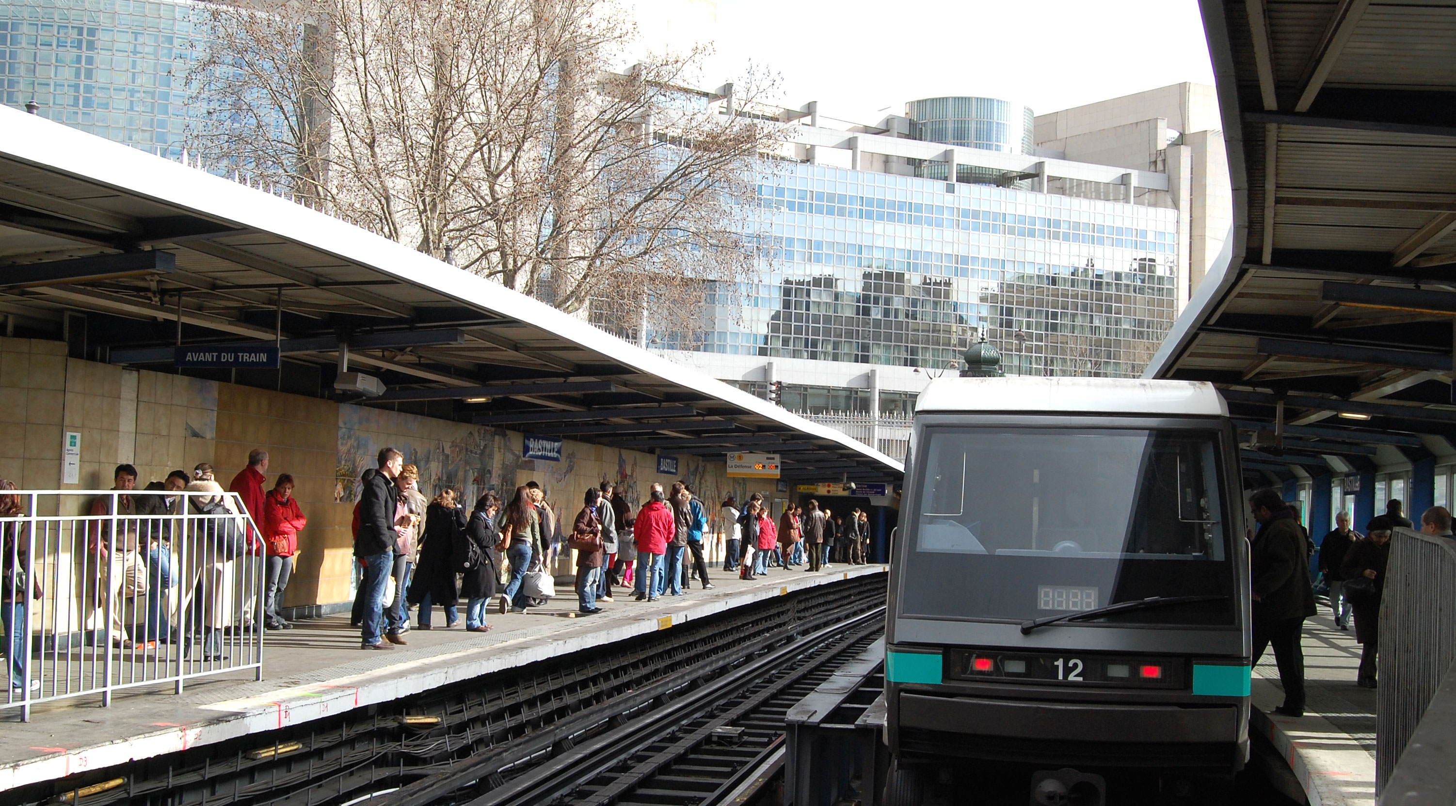 Station Bastille du Métro de Paris (ligne 1), Paris, France. On distingue en arrière plan l'Opéra Bastille